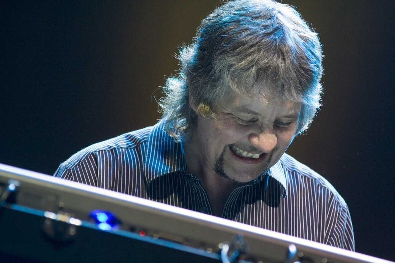 Deep Purple Live @ Via Funchal - 07/03/2009 - São Paulo, Brasil Fotógrafo: Alexandre Cardoso